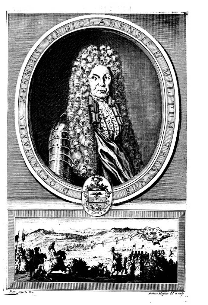 Amussis munitoria Octaviani Mennii Mediolanensis militaris tribuni sub auspiciis catholici, et augustissimi regis Hispaniarum, &c. continens elementa, et vera munitionis fundamenta. Divisa in 4 libros, tam nova, quam geometrica methodo prenucleata, multaque theoremata, et necessaria problemata ad primogenitam lineam scite discernendam demonstrata, quibus addita sunt trigonometria ad munitionis partes indagandas canon mathematicus, et praxes ... . - Neapoli : per Joannem Rosellium typographum hujus fidelissimae civitatis, 1702. - [8], 361, [5] p., [25] c. di tav. di cui 23 ripiegate : ill., ritratto ; 2° .